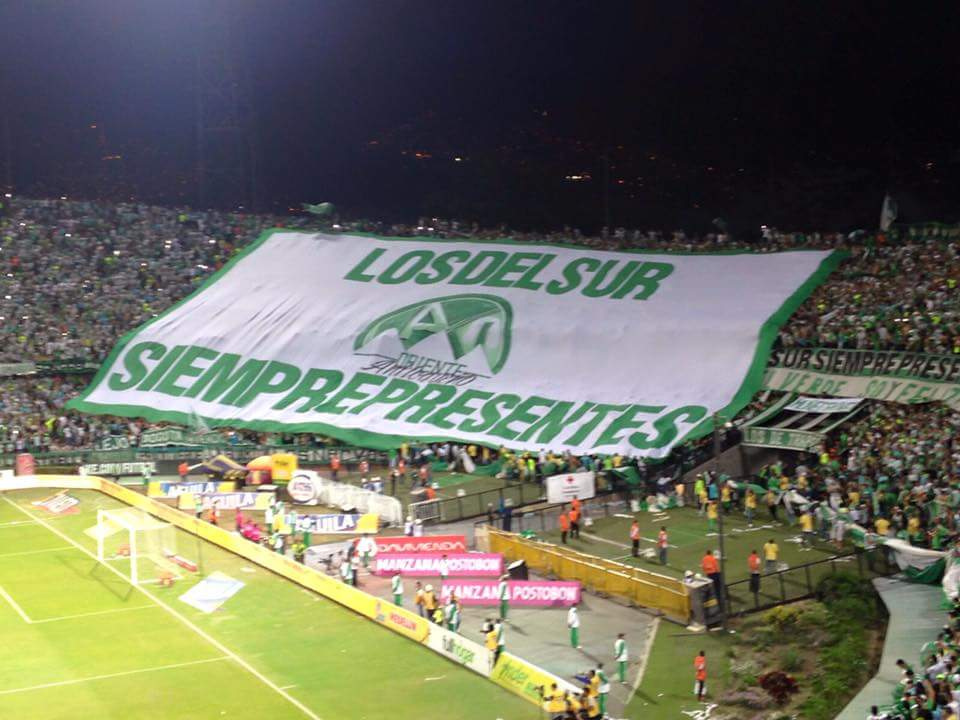 Club Atlético Nacional S. A.. Esta fotografía fue tomada en el municipio colombiano con código 05001.